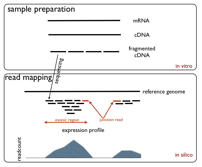 Kurzbeschreibung: RNA wird zu cDNA konvertiert und anschließend fragmentiert. Durch die Sequenzierung werden kurze „reads“ beobachtet, welche dann mit dem Referenzgenom (oder Transkriptom) verglichen werden. Diese „reads“ können dann als exonic reads oder „junction reads“ klassifiziert werden. Damit kann ein Expressionsmuster aufgebaut werden.